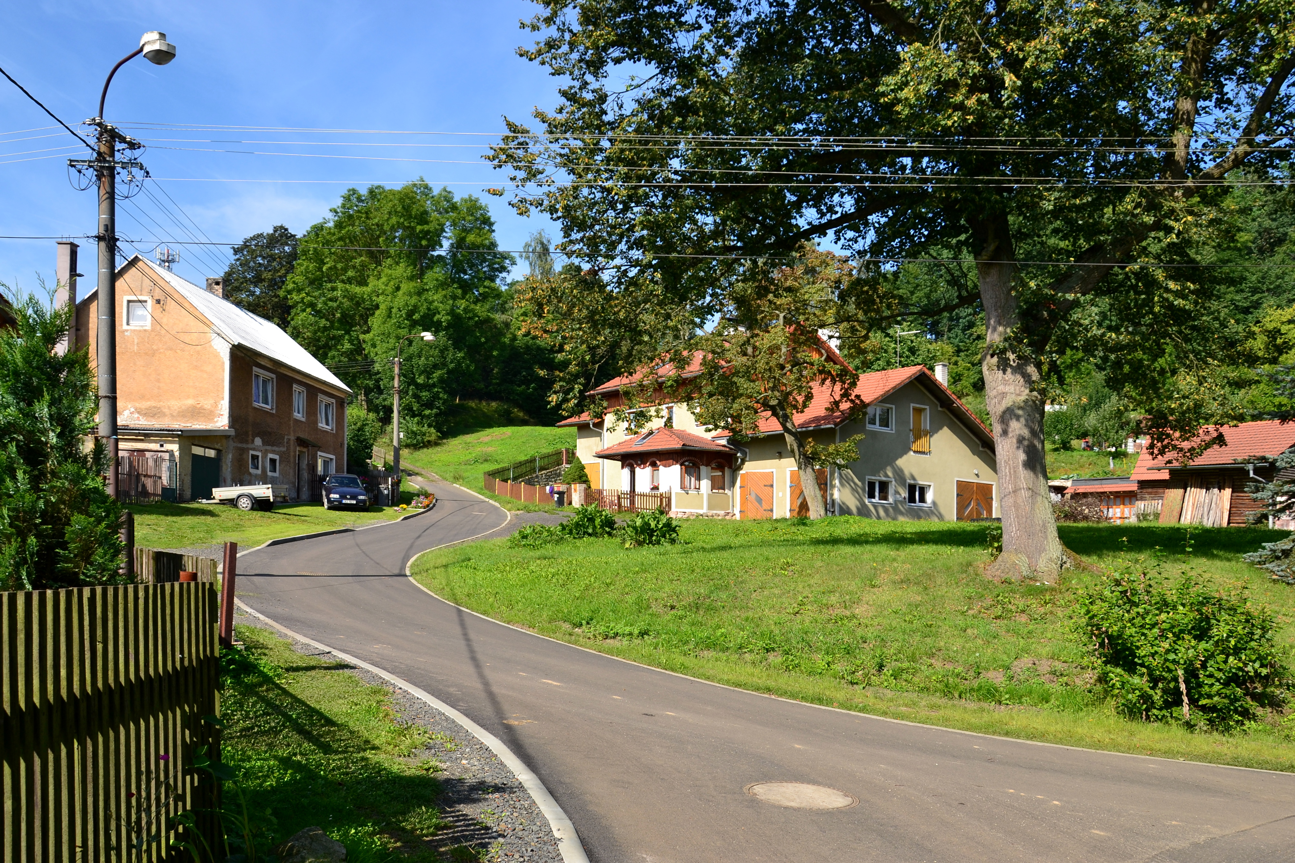 Náves